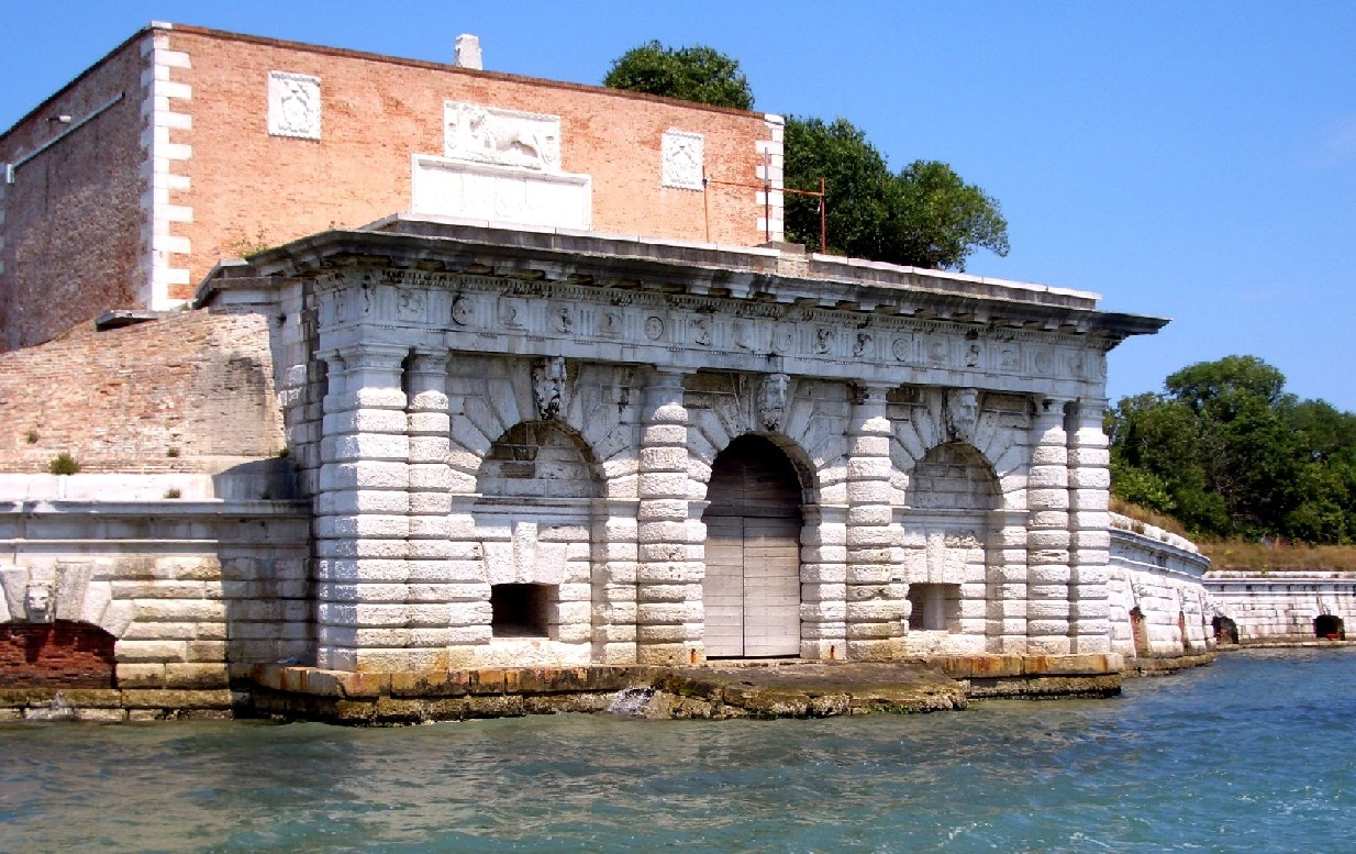 Il Forte di Sant'Andrea sull'isola delle Vignole (Venezia). La foto è stata scattata da me l'1.7.06.